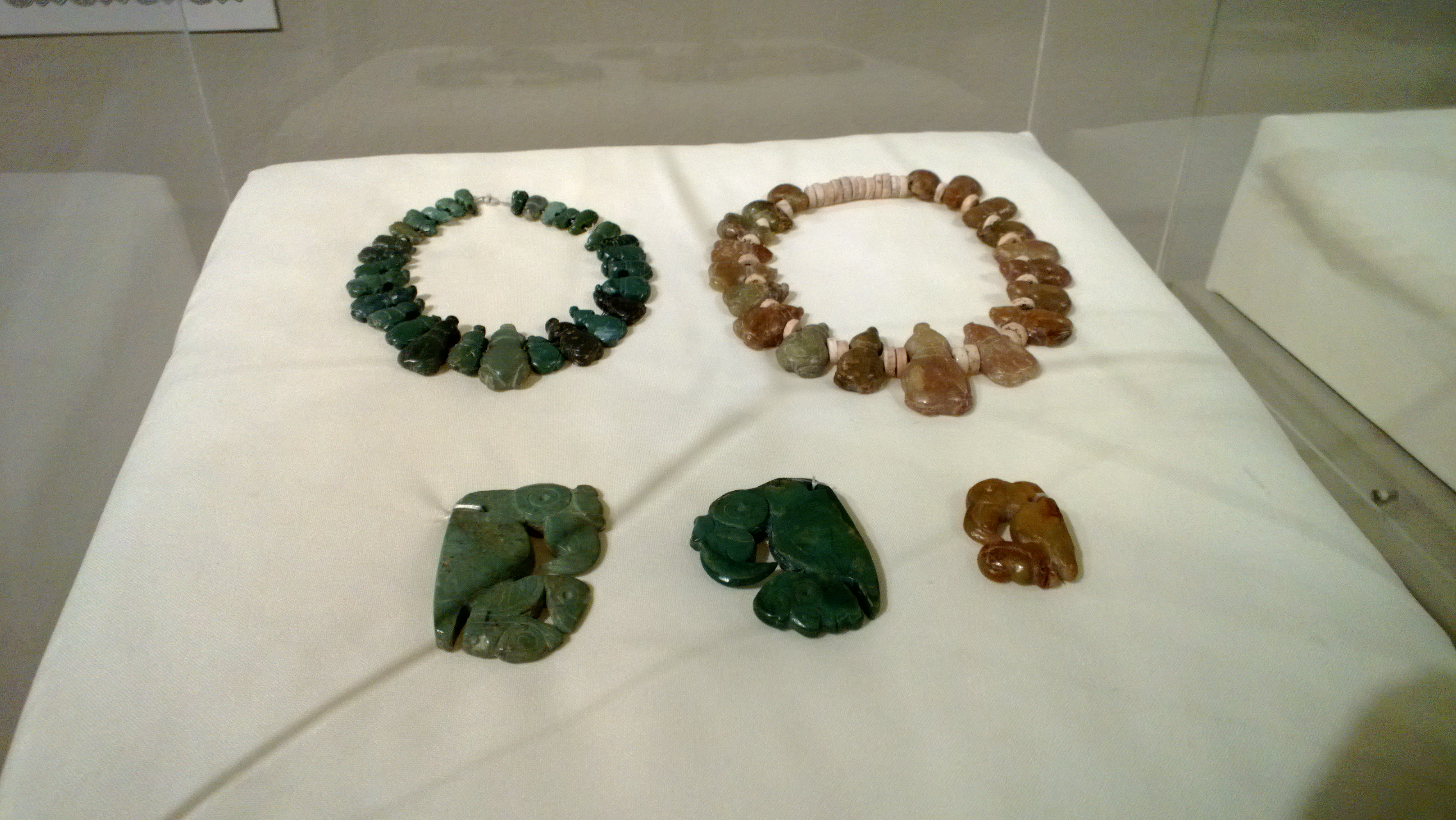 Amuletos bimorfos que representan el cóndor andino con una cabeza trofeo en las garras elaboradas por los grupos huecoides en Puerto Rico